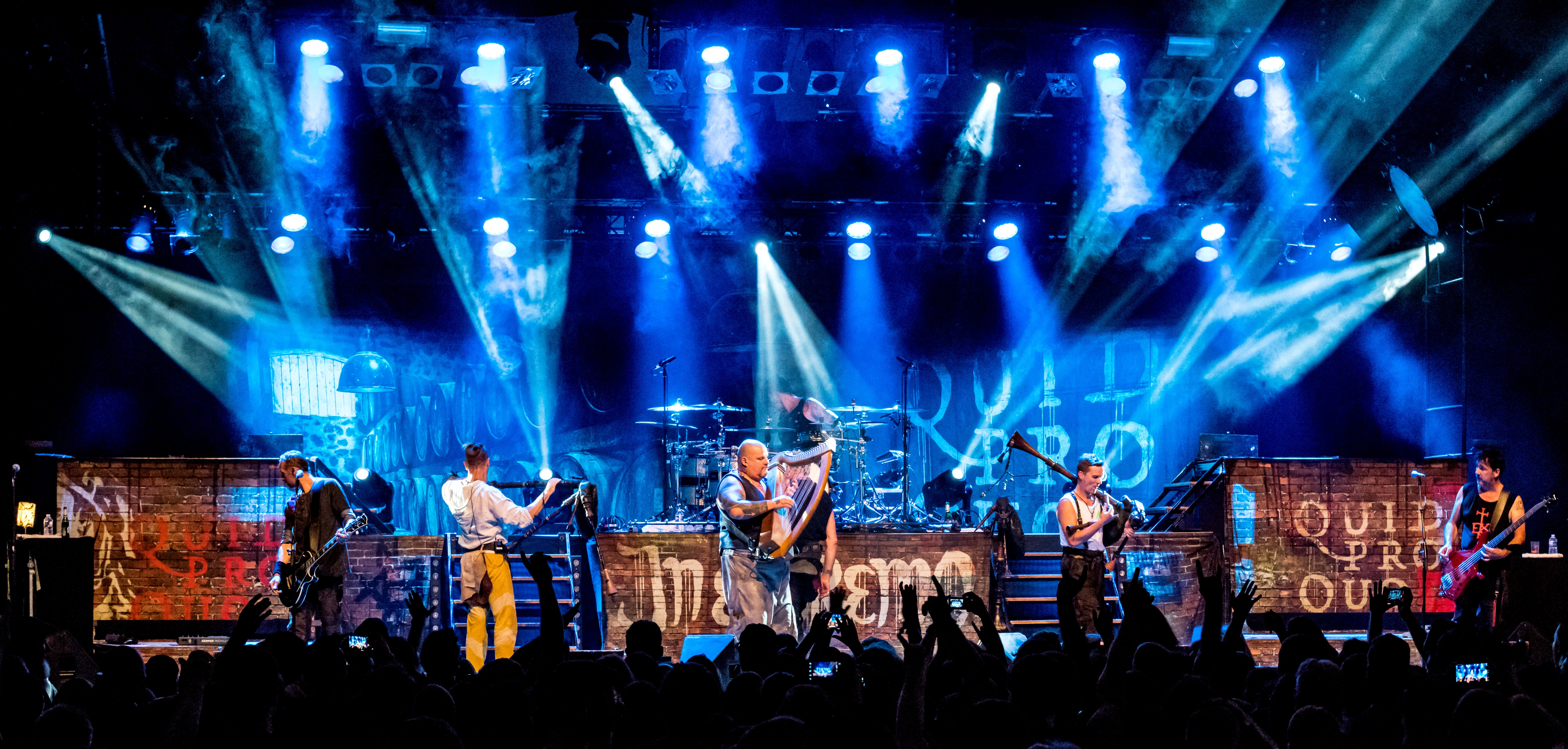 Bilder vom Zelt Musik Festival 2018 in Freiburg im Breisgau In Extremo am 29.07.2018 im Zirkuszelt